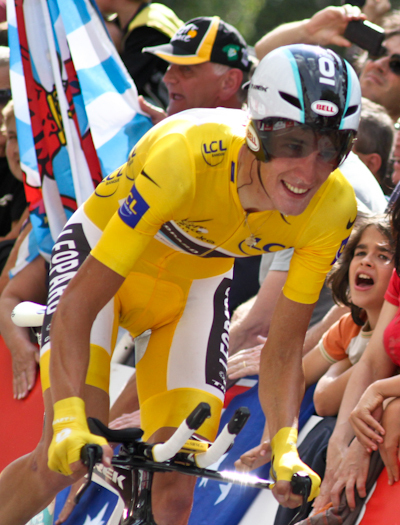 Andy Schleck en jaune